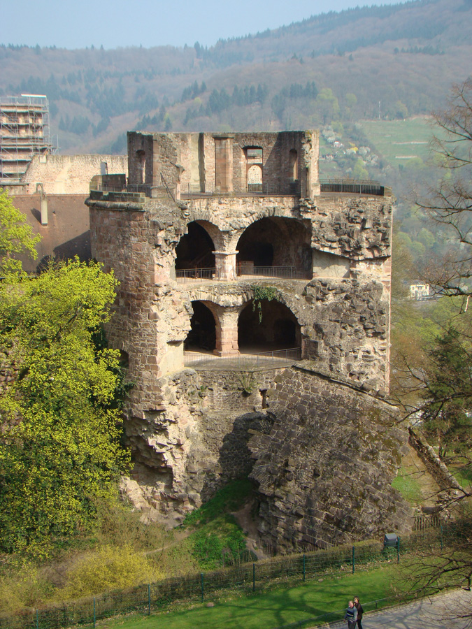 Schloss in Heidelberg, Gesprengter Turm